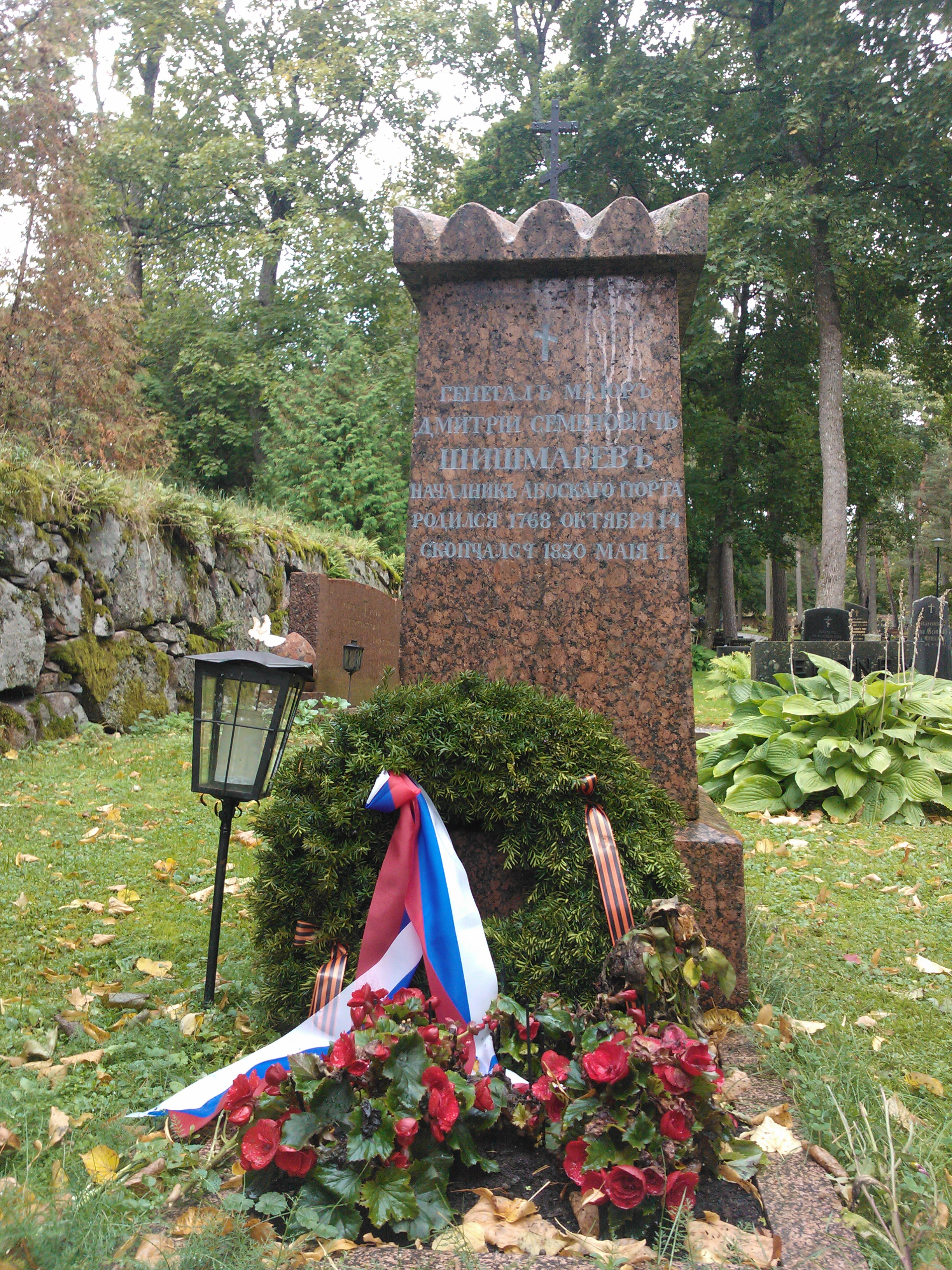 Могила генерал-майора Дмитрия Шишмарёва на православном участке кладбища в Турку (Финляндия)